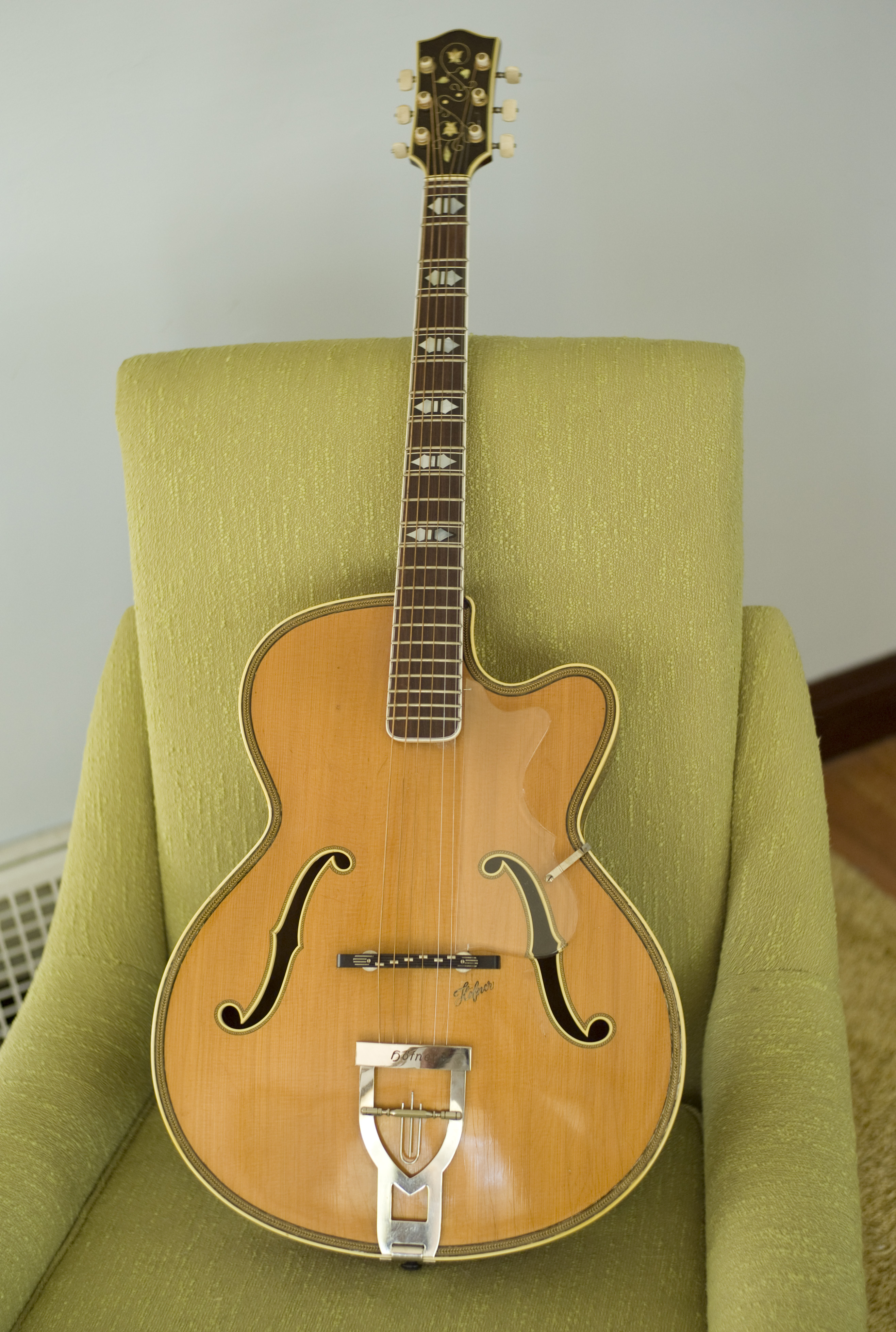 1953 Hofner 465/S vintage archtop guitar.